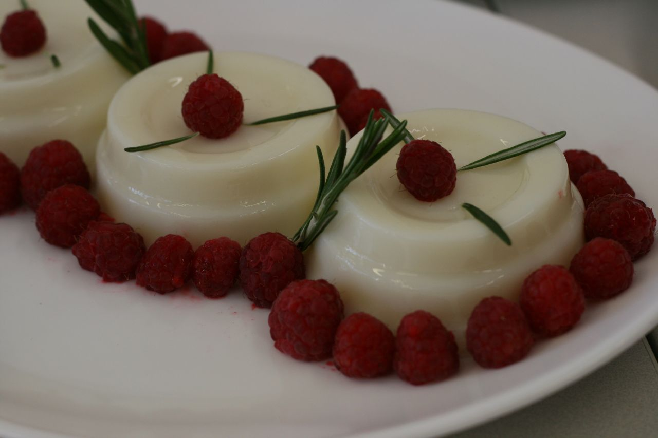 Rosemary panna cotta Rosmariini panna cotta. A la carte cookery course, spring 2008. Tallinna Teeninduskooli a la carte kokakursused, kevad 2008